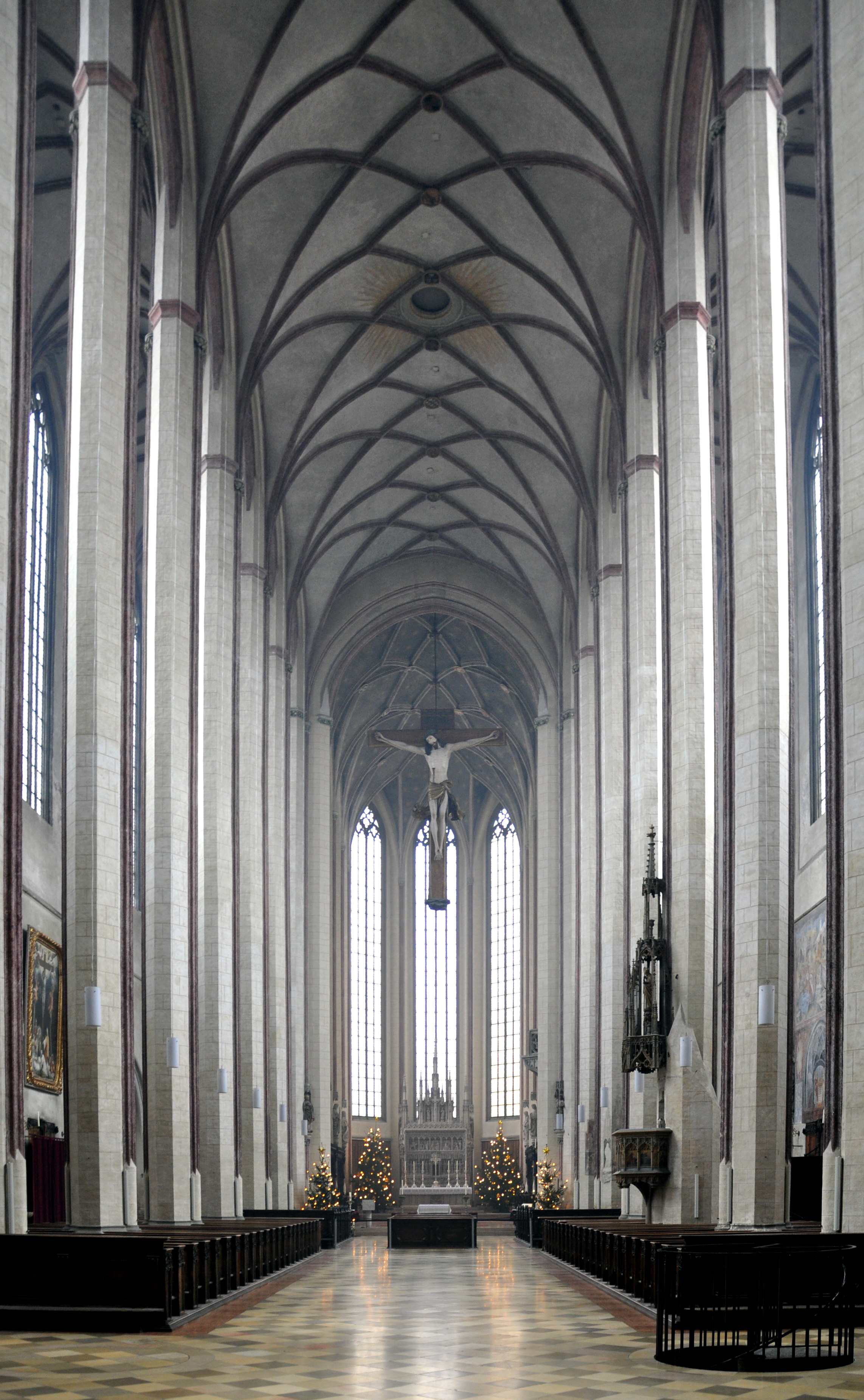 Landshut, St. Martin, Blick zum Chor